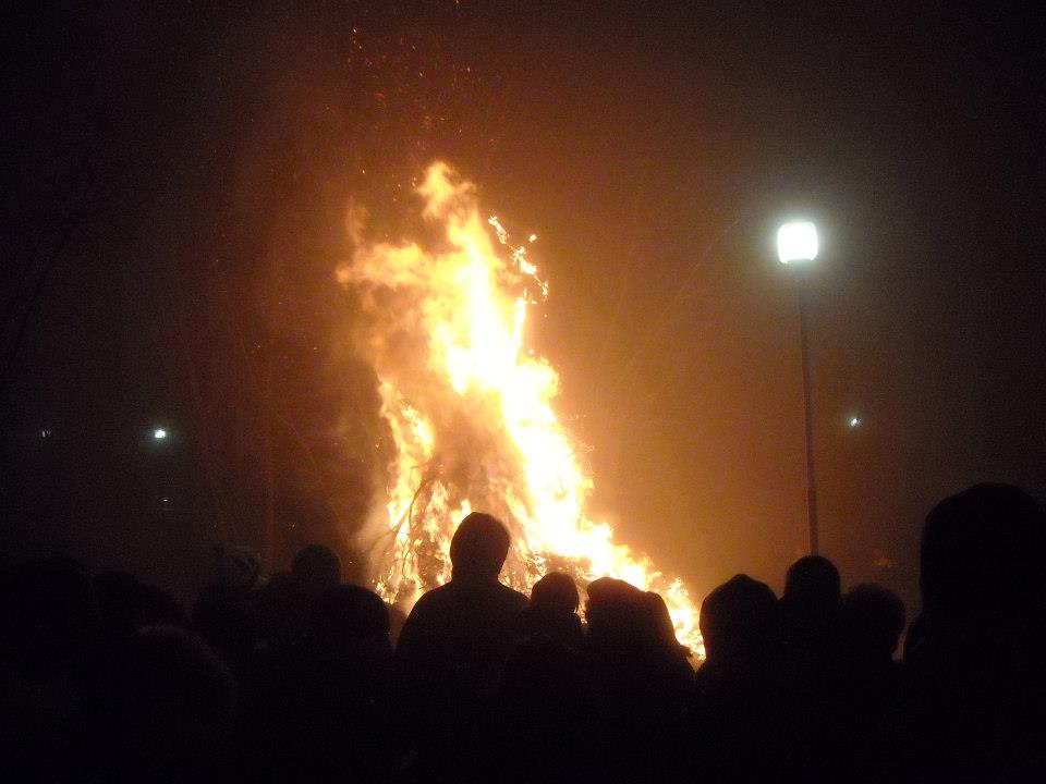 La Giobia 2013 ad Arsago Seprio